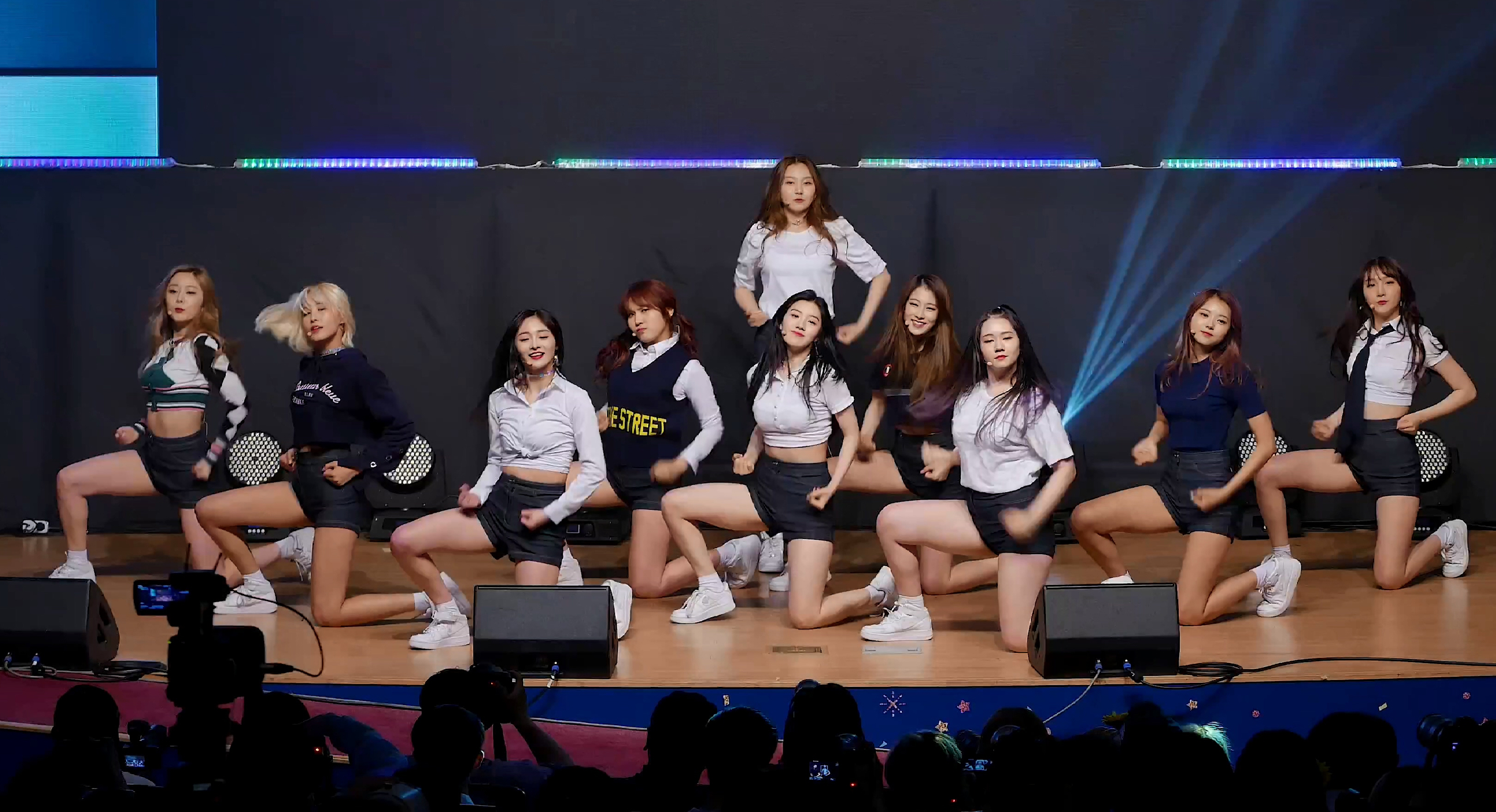 170530 선플 콘서트 - 프리스틴 'WEE WOO' 4K 직캠 by DaftTaengk